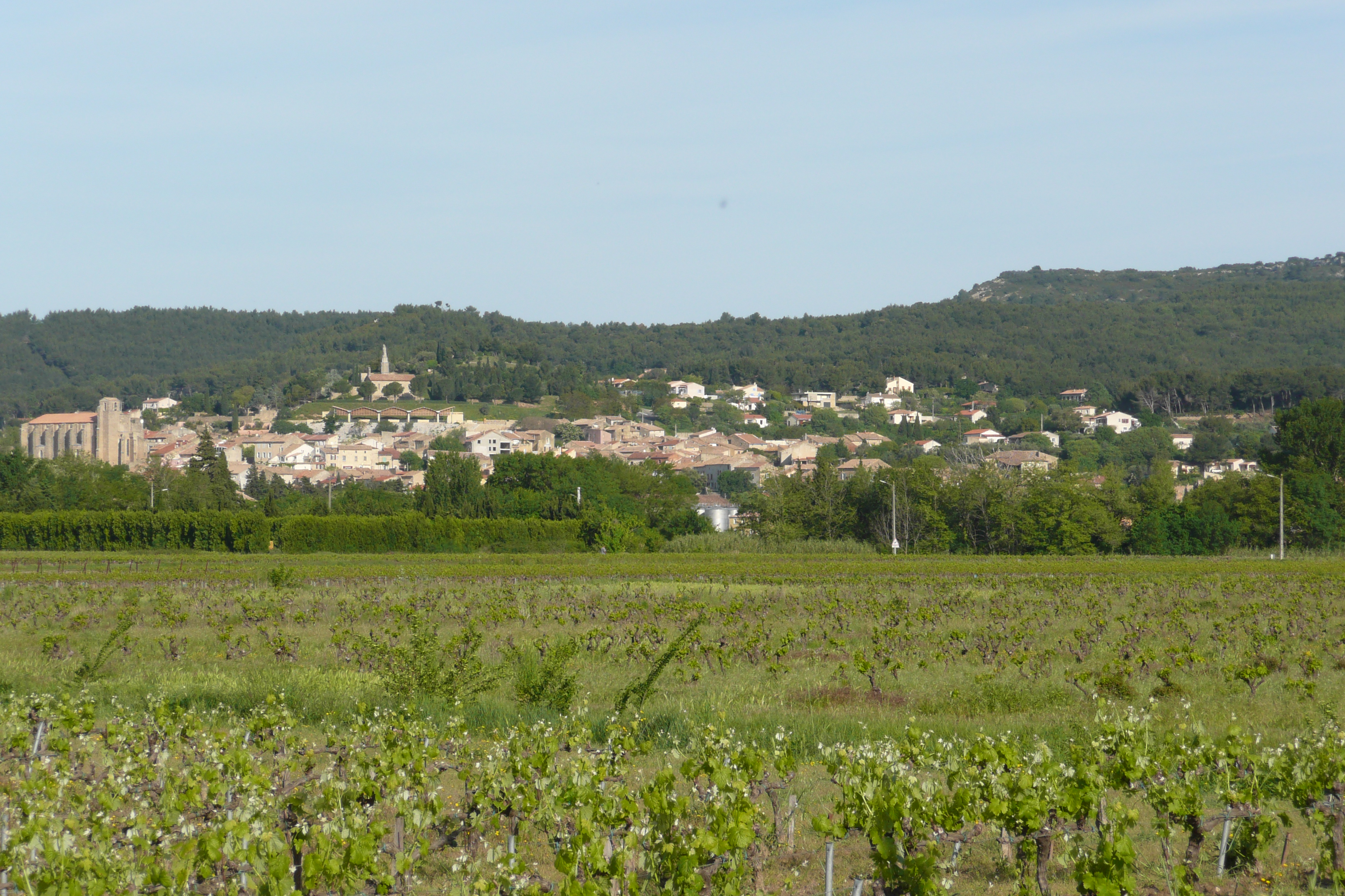 Vue sur Laudun-l'Ardoise.